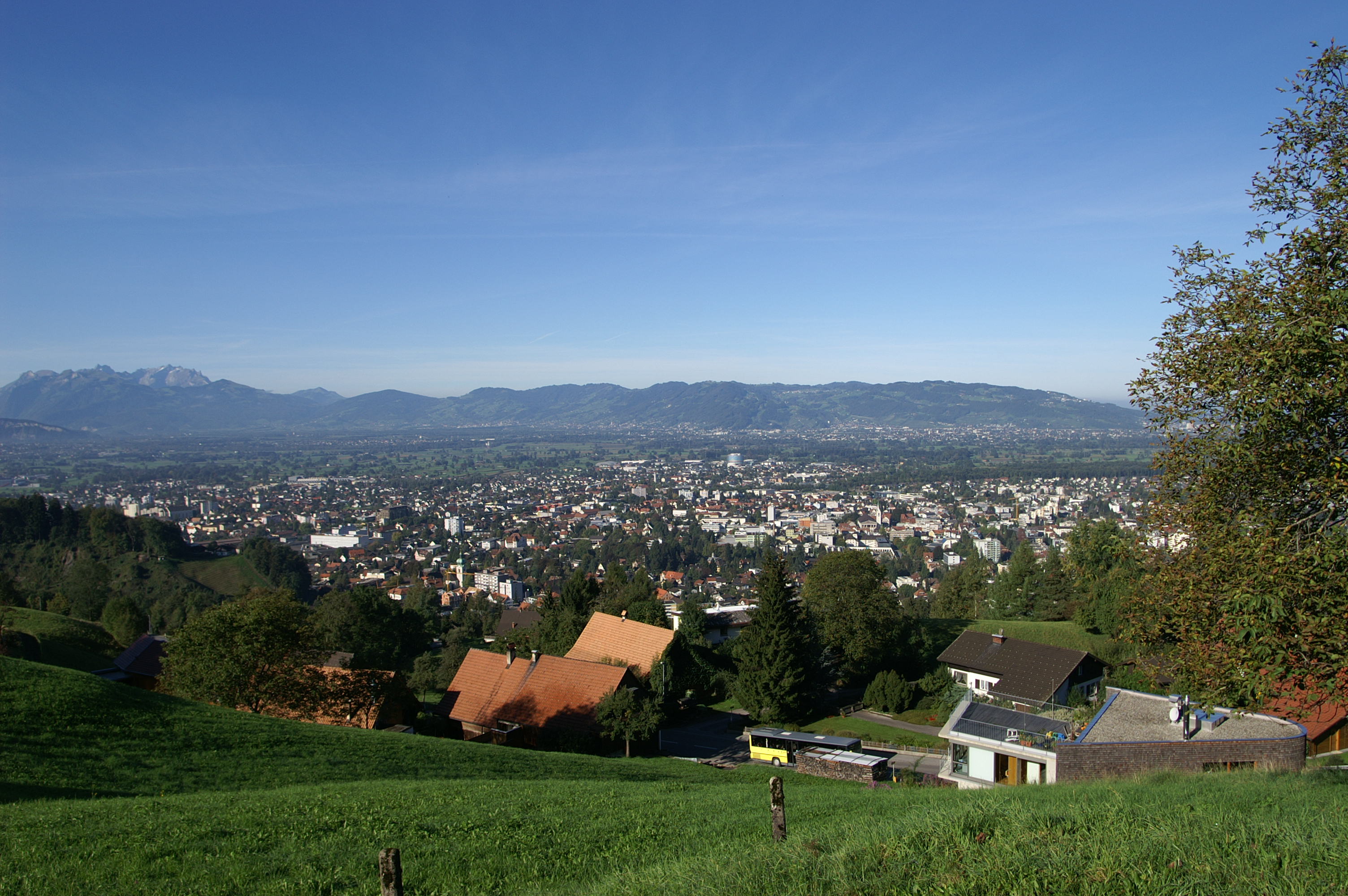 Blick von Watzenegg auf Dornbirn.